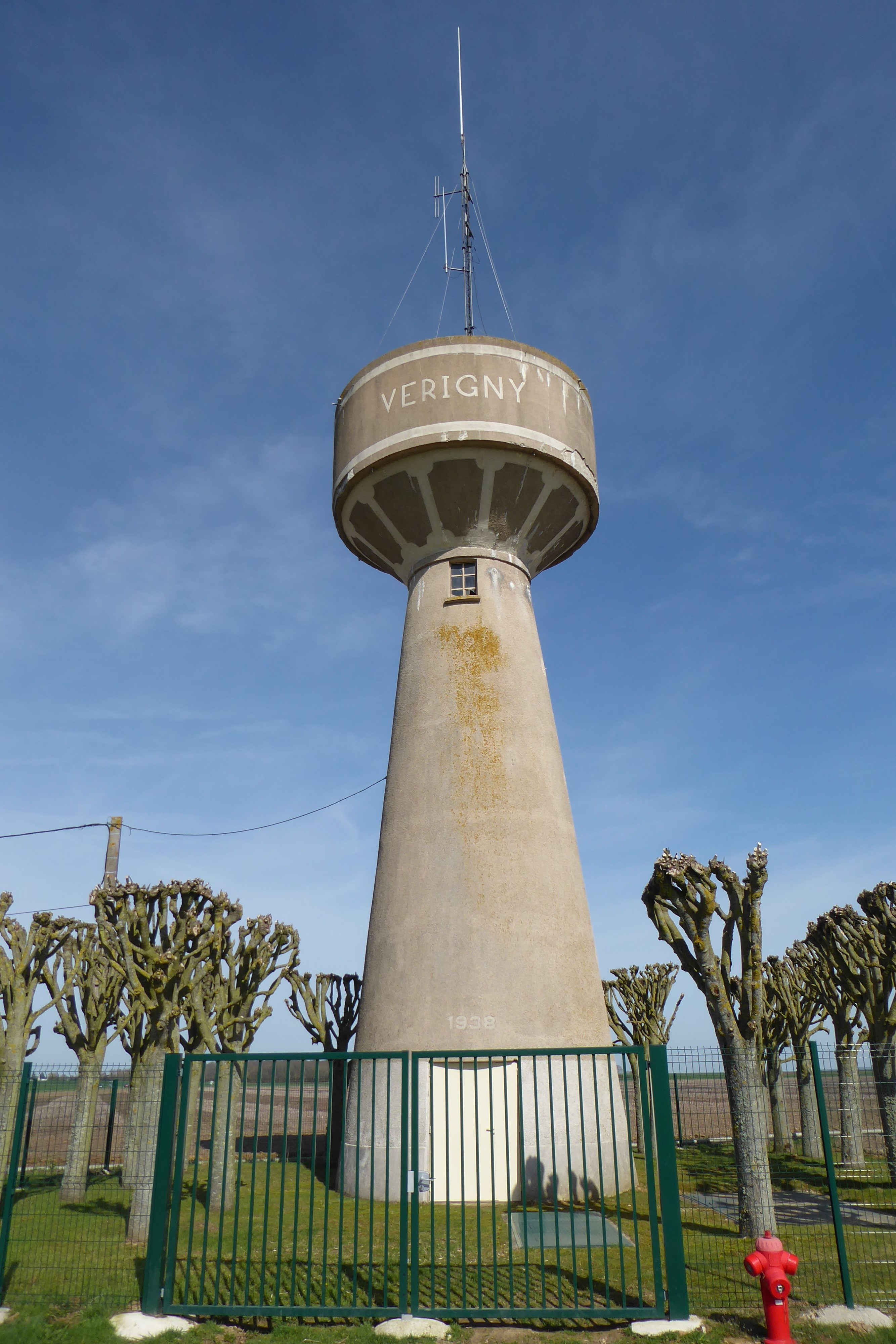 château d'eau de Vérigny, route départementale 939, Eure-et-Loir, France.